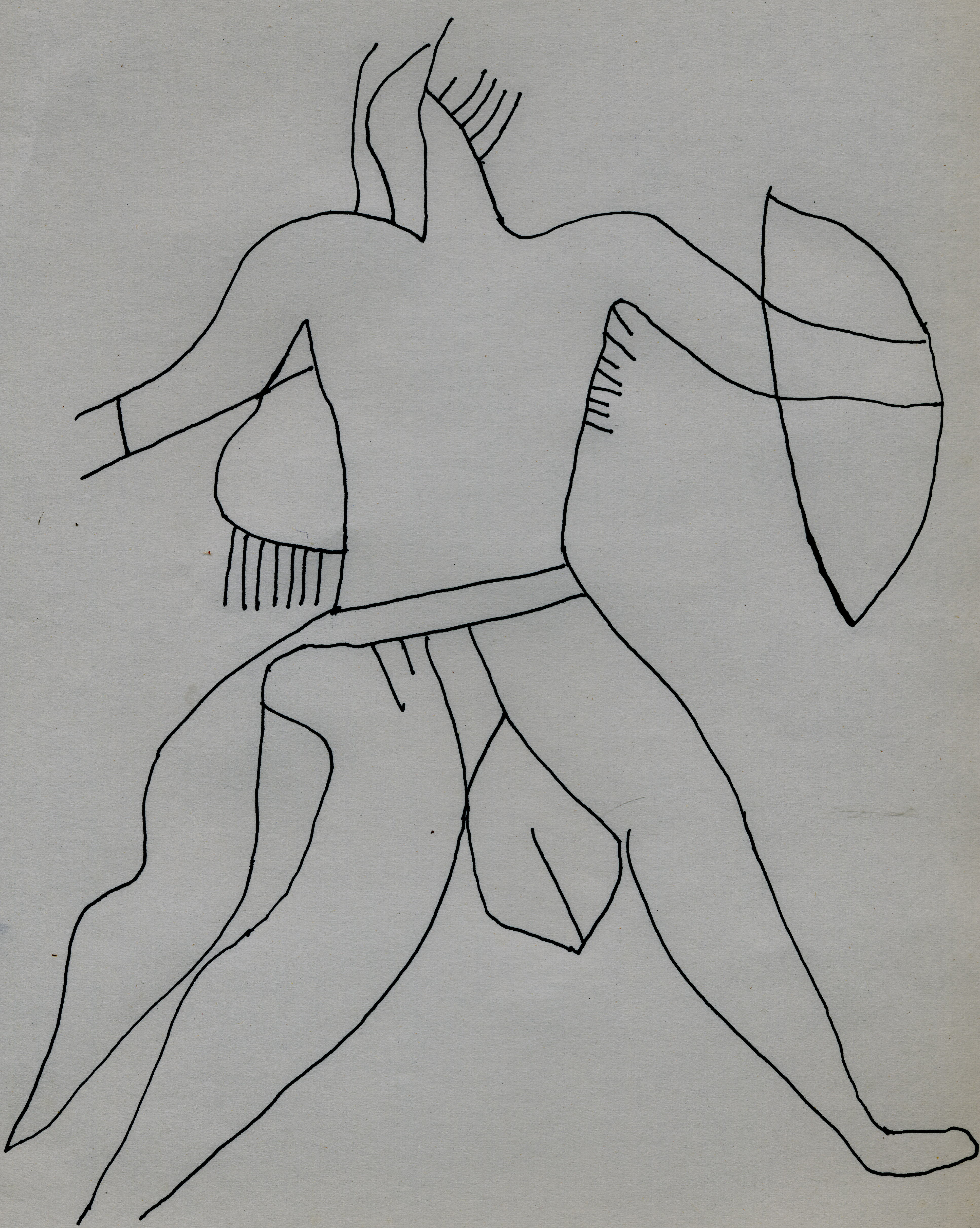 Croquis schématique d'une figuration humaine, détail d'une gravure néolithique de l'Oued Djerat, dans le Tassili n'Ajer (Algérie)